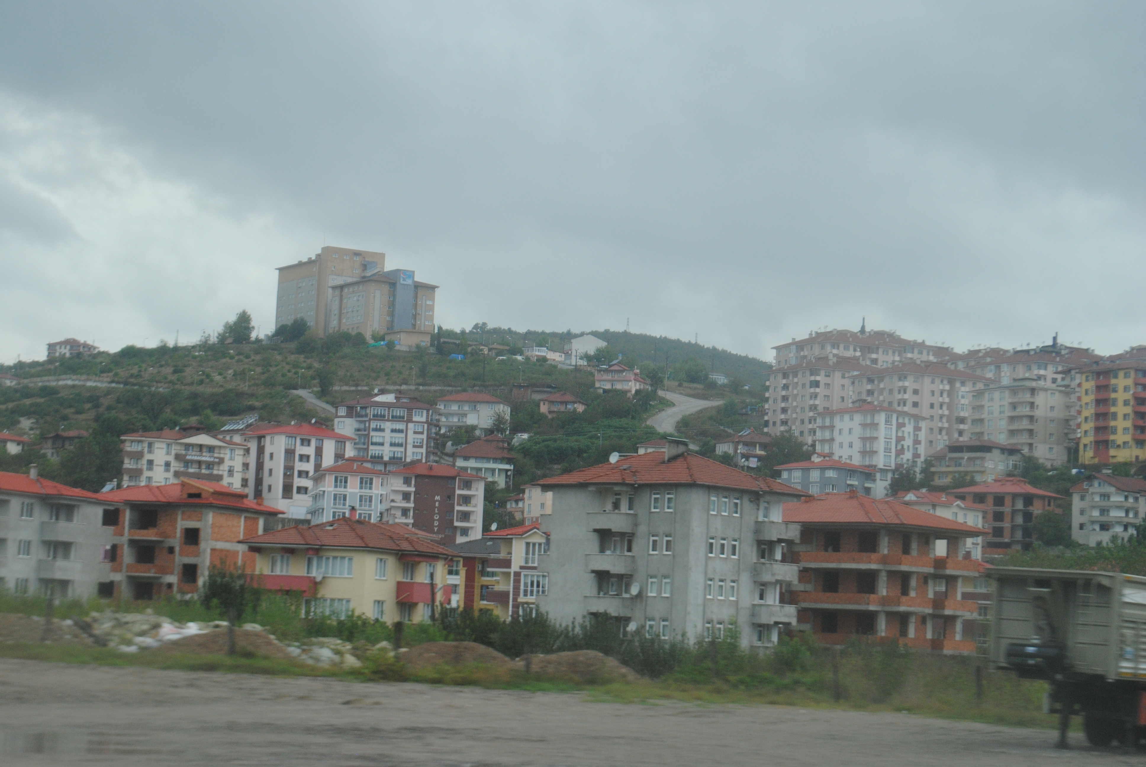 Bartın'dan çeşitli görüntüler